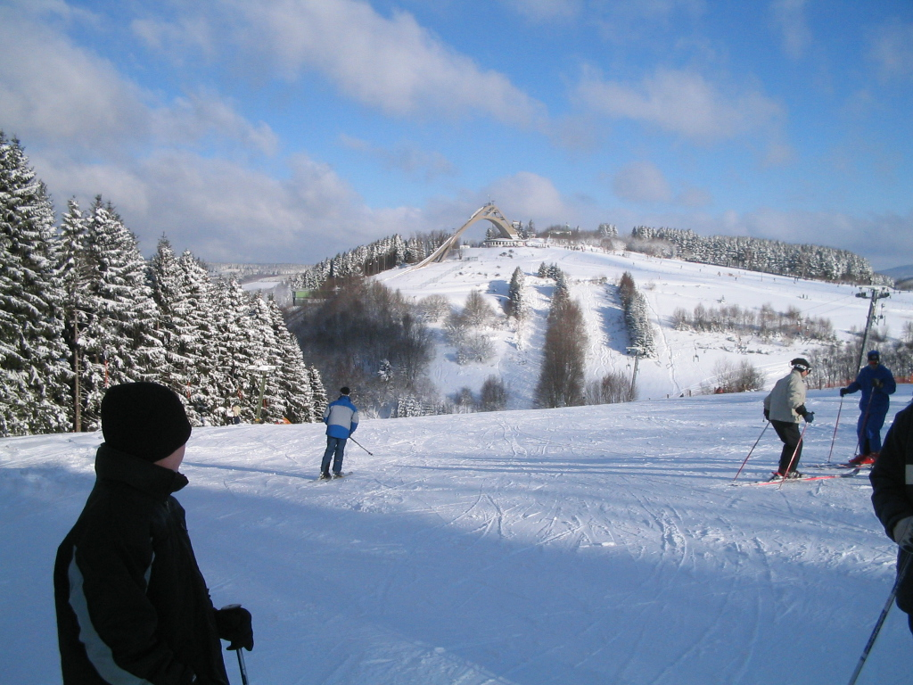 Het skigebied van Winterberg met op de achtergrond de "Sankt Georgschanze". - Hans van den Wijngaard